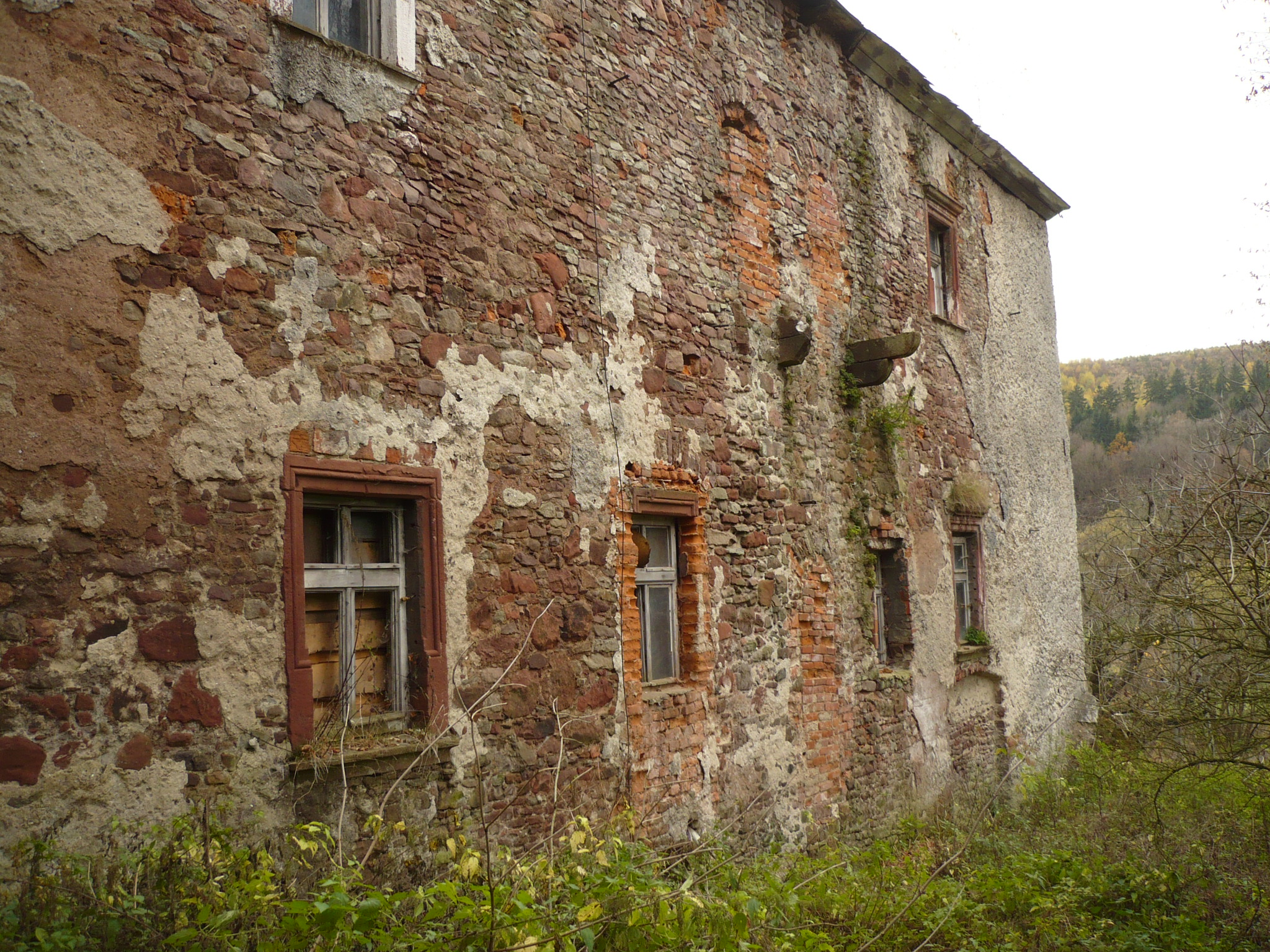 Dwór Dolny Włodowice